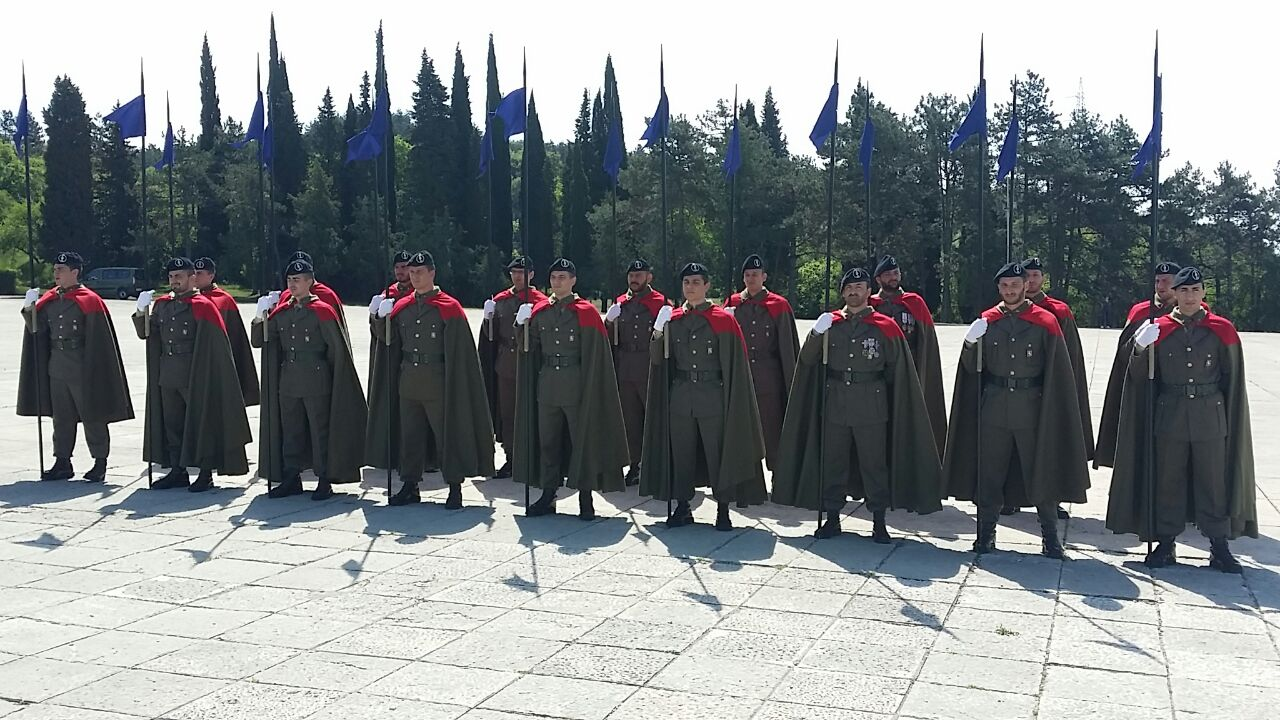 Piemonte Cavalleria. Uniformi di Rappresentanza (2015). Presso Sacrario Redipuglia